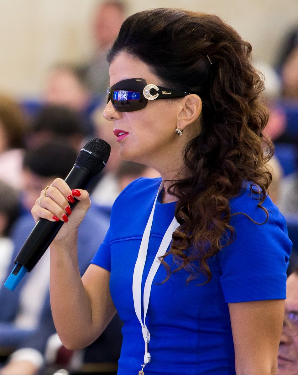 Диана Гудаевна Гурцкая (род. 1978) — российская эстрадная певица